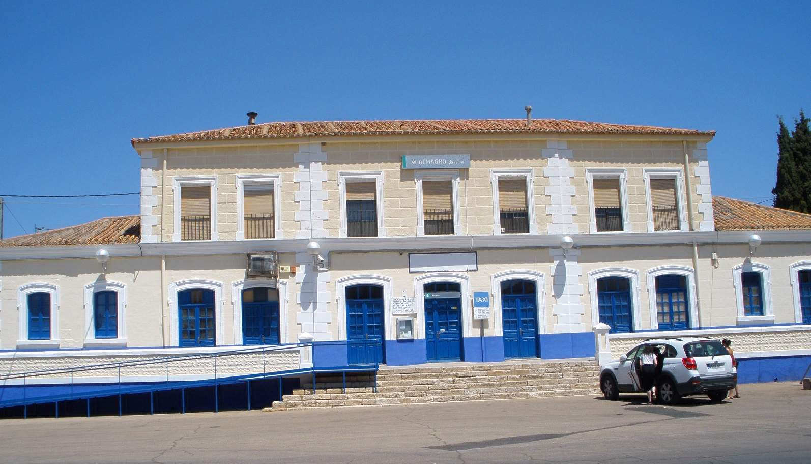 Estación de Adif de Almagro (Ciudad Real)